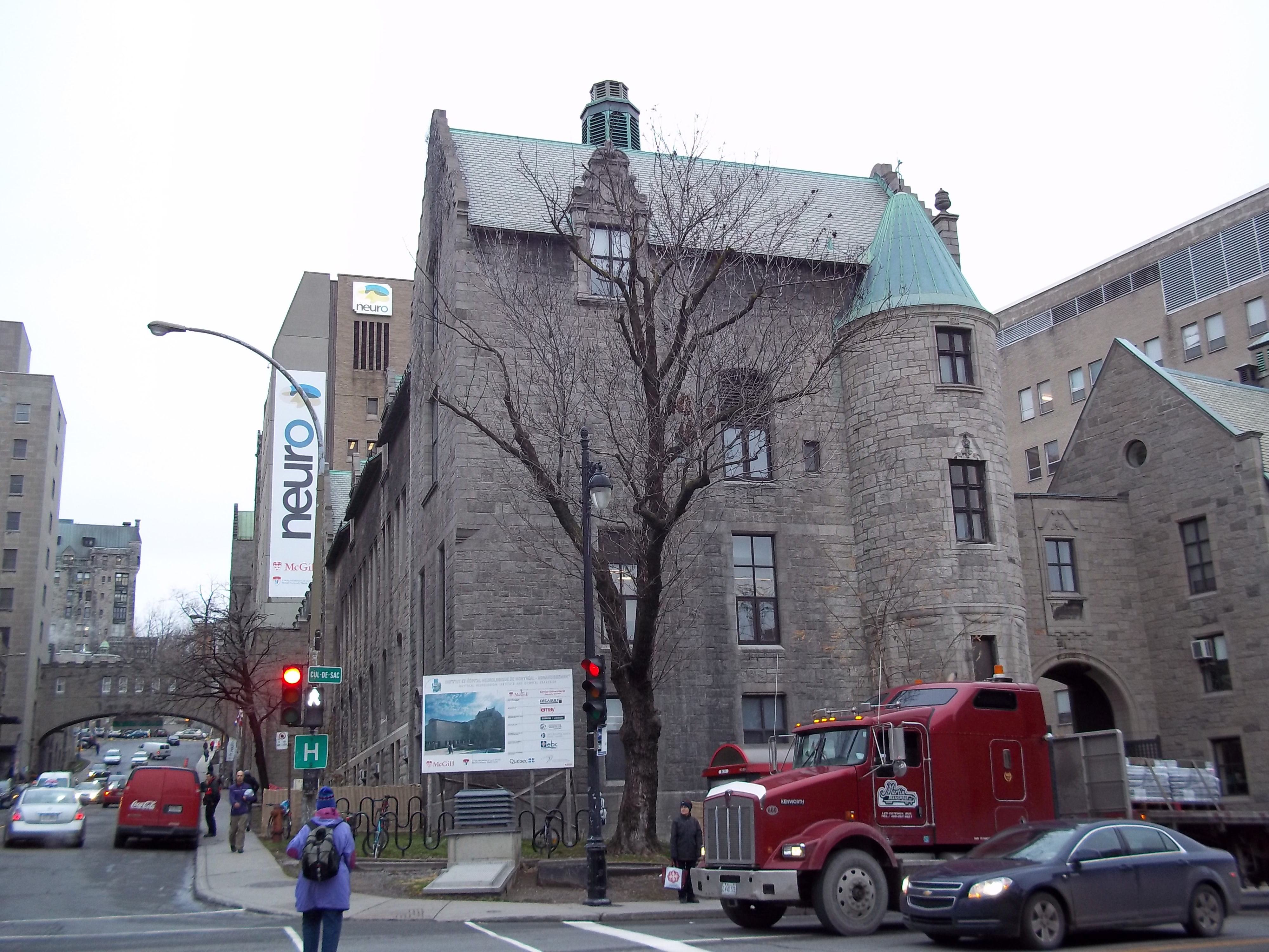 Institut et hôpital neurologiques de Montréal, 3801, rue University, Montréal, Québec Vue de l'avenue des Pins